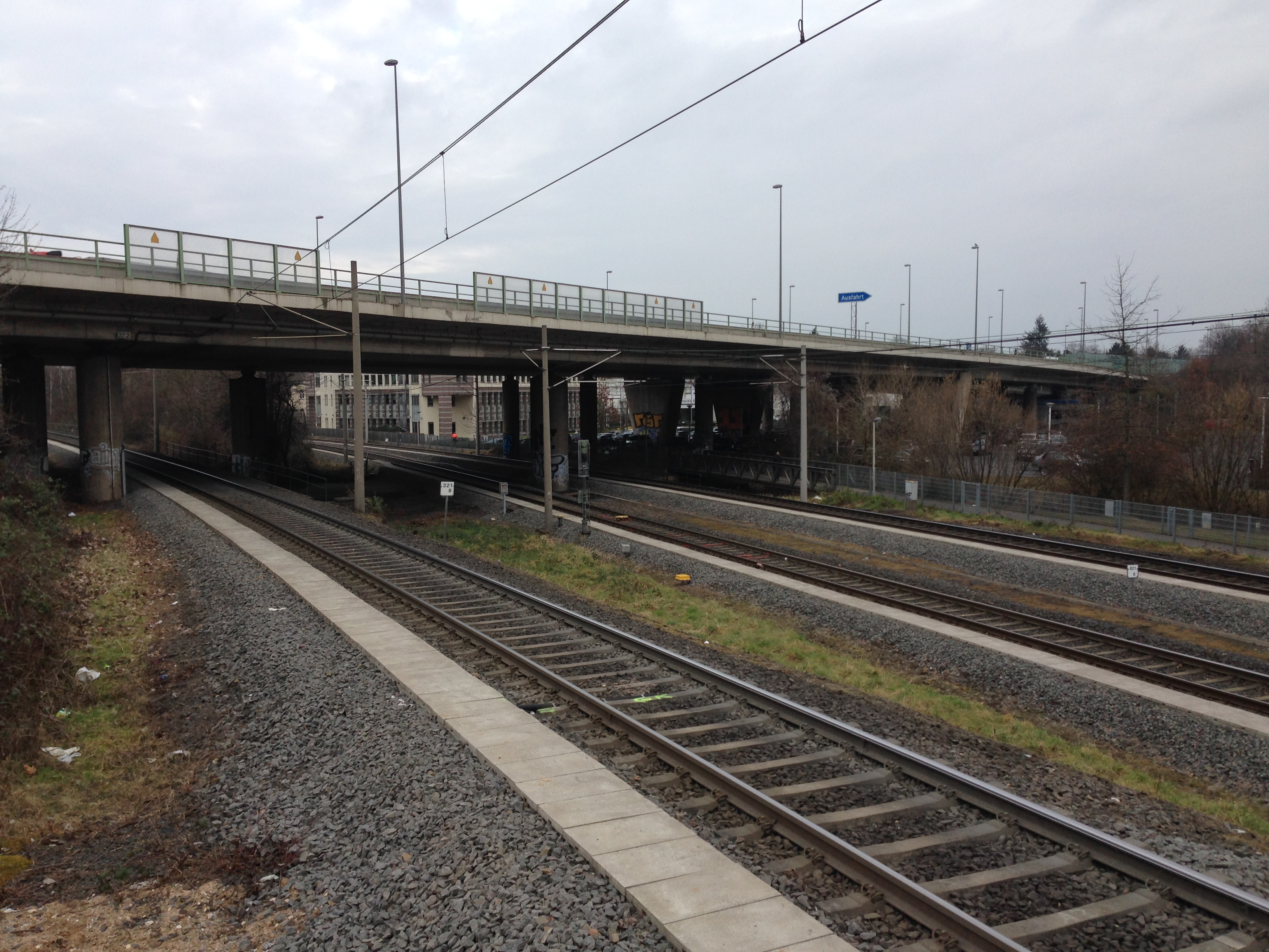 Tausendfüßler (Bonn), Blickrichtung: Nord